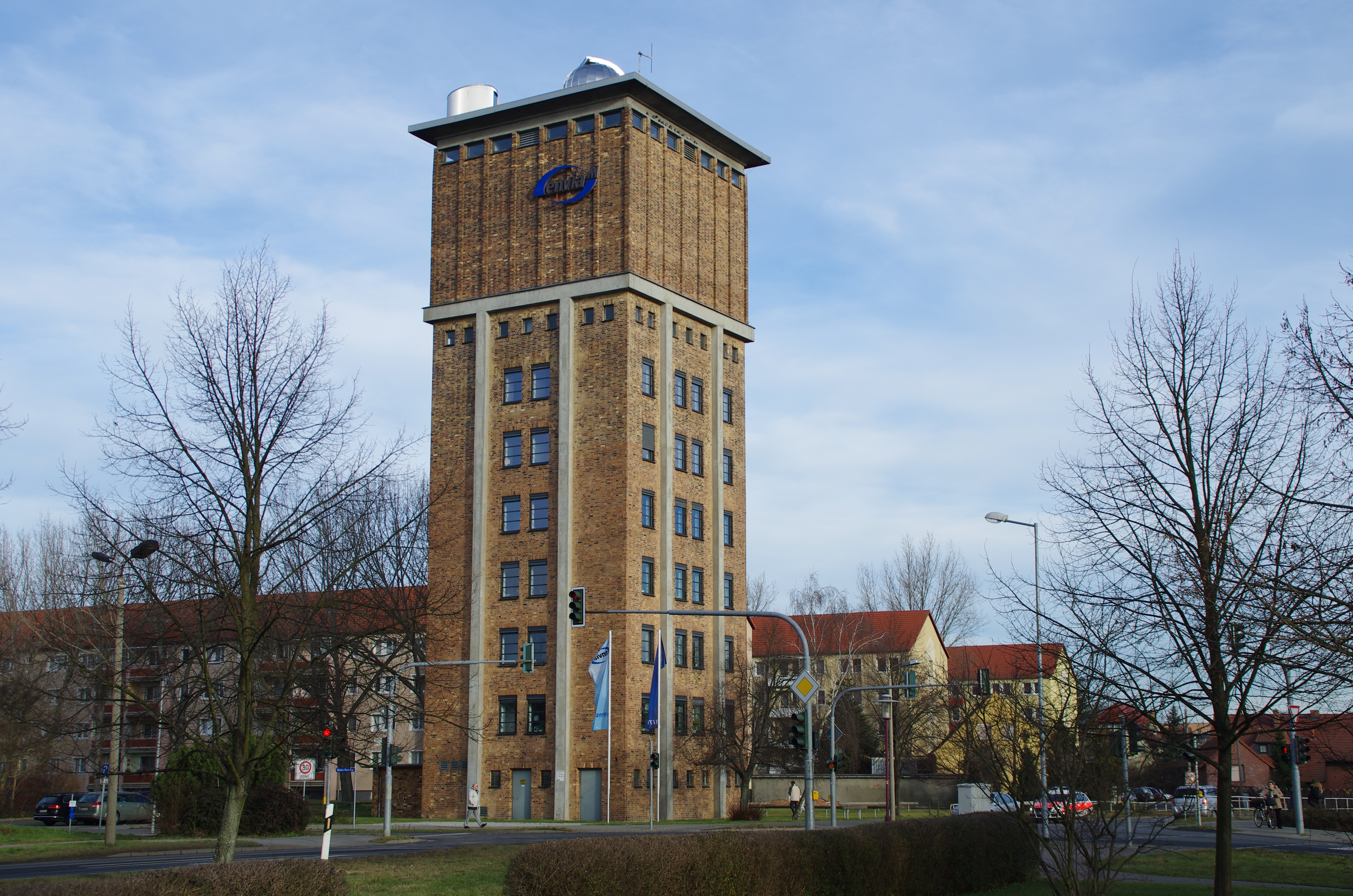 Herzberg Elster in Brandenburg. Das Haus wie im Namen beschrieben steht unter Denkmalschutz.